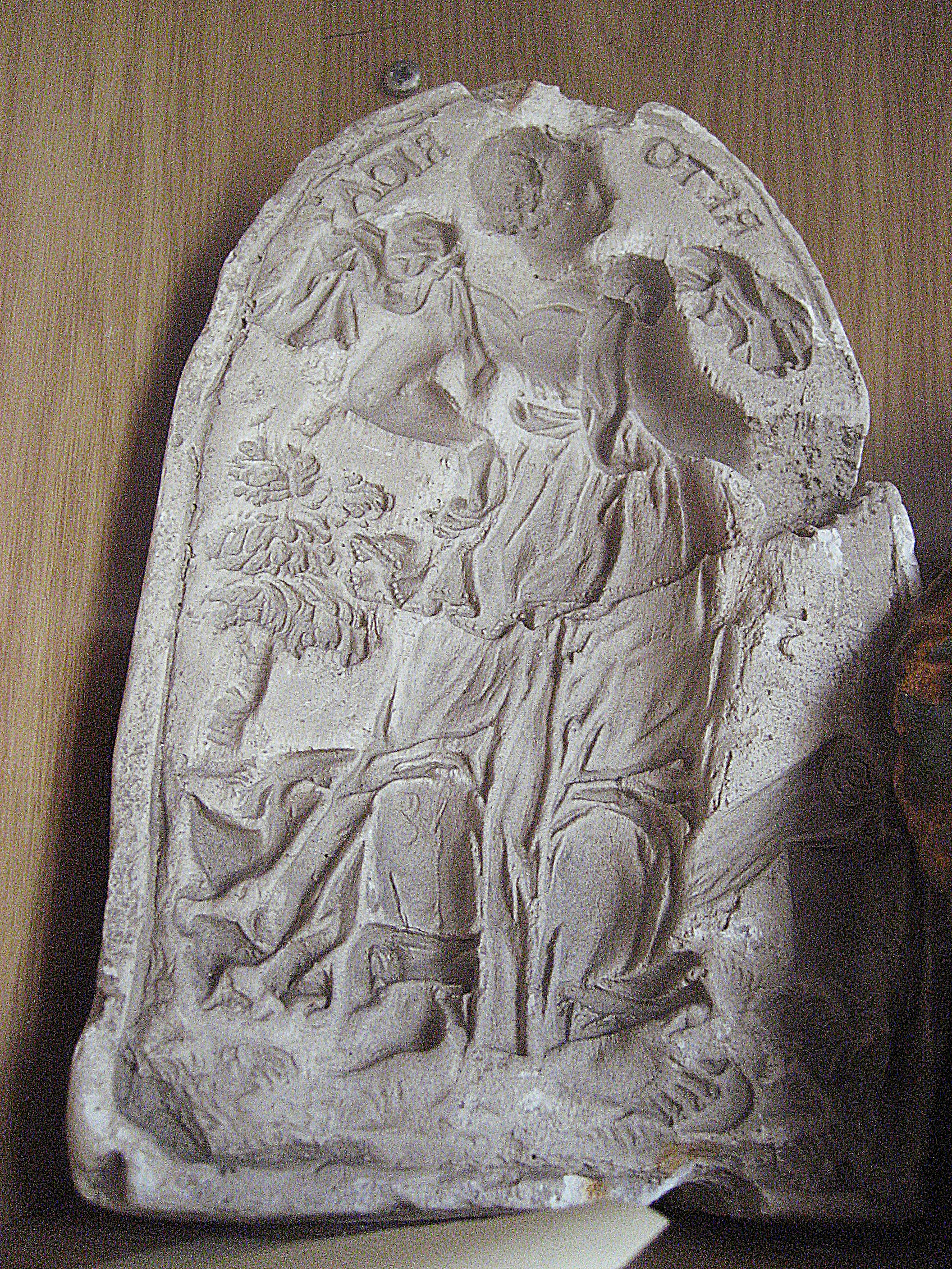 Allegorie der Rhetorik aus St. Georgen / Rottal / Niederbayern